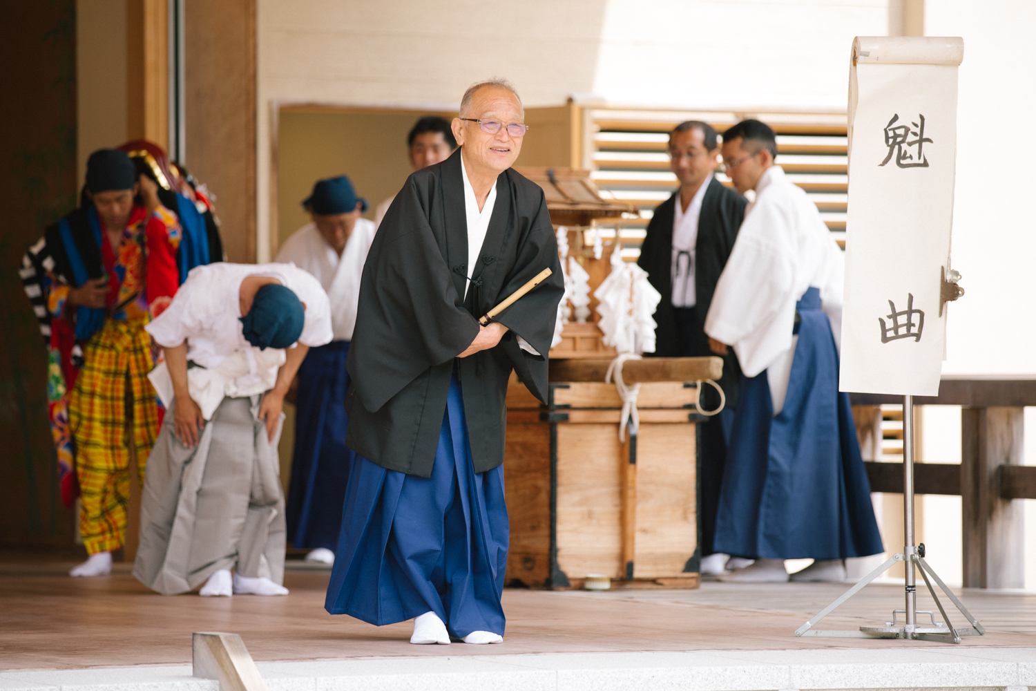 二十三代目山本源太夫